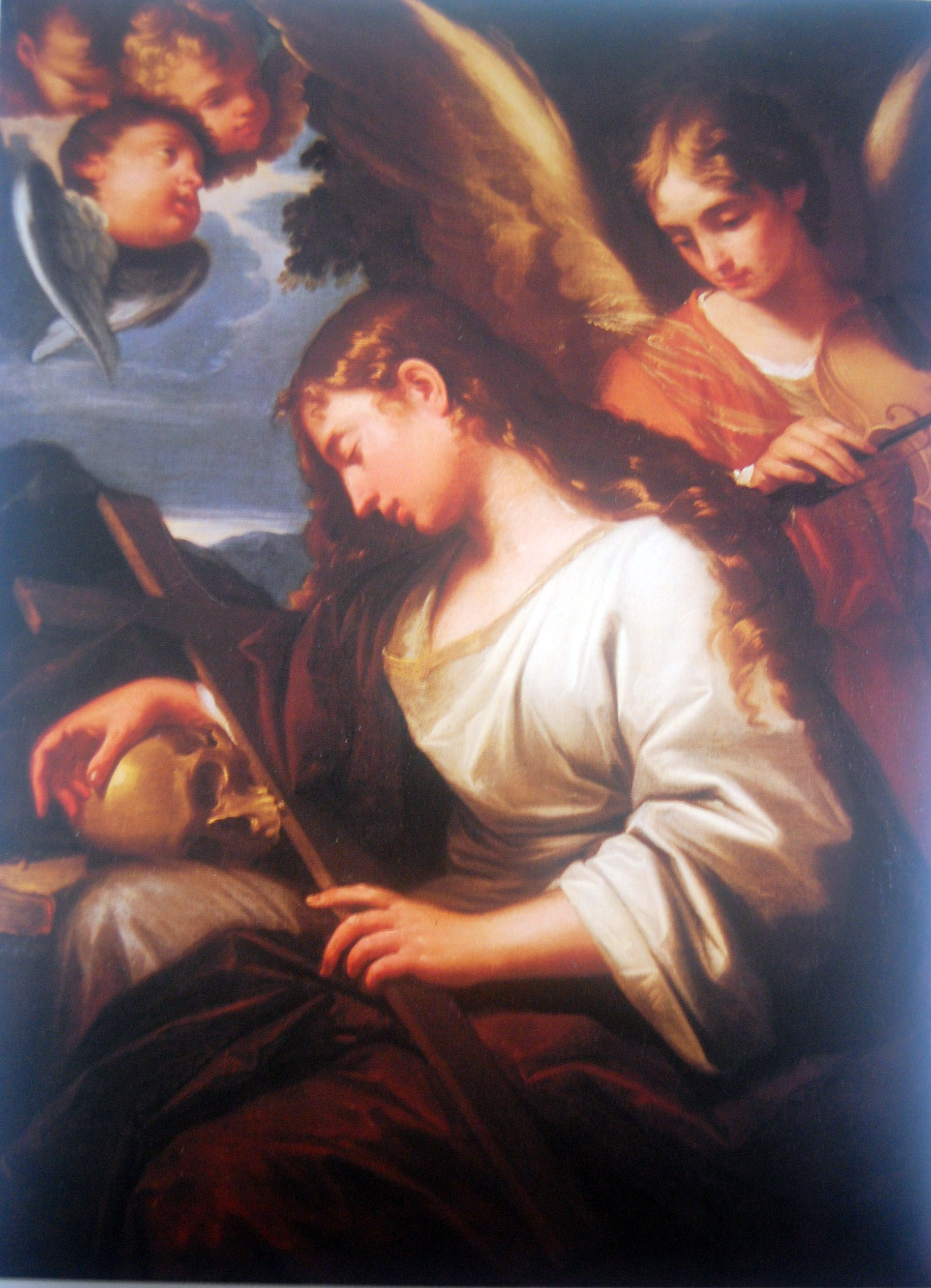 Penitent Magdalene